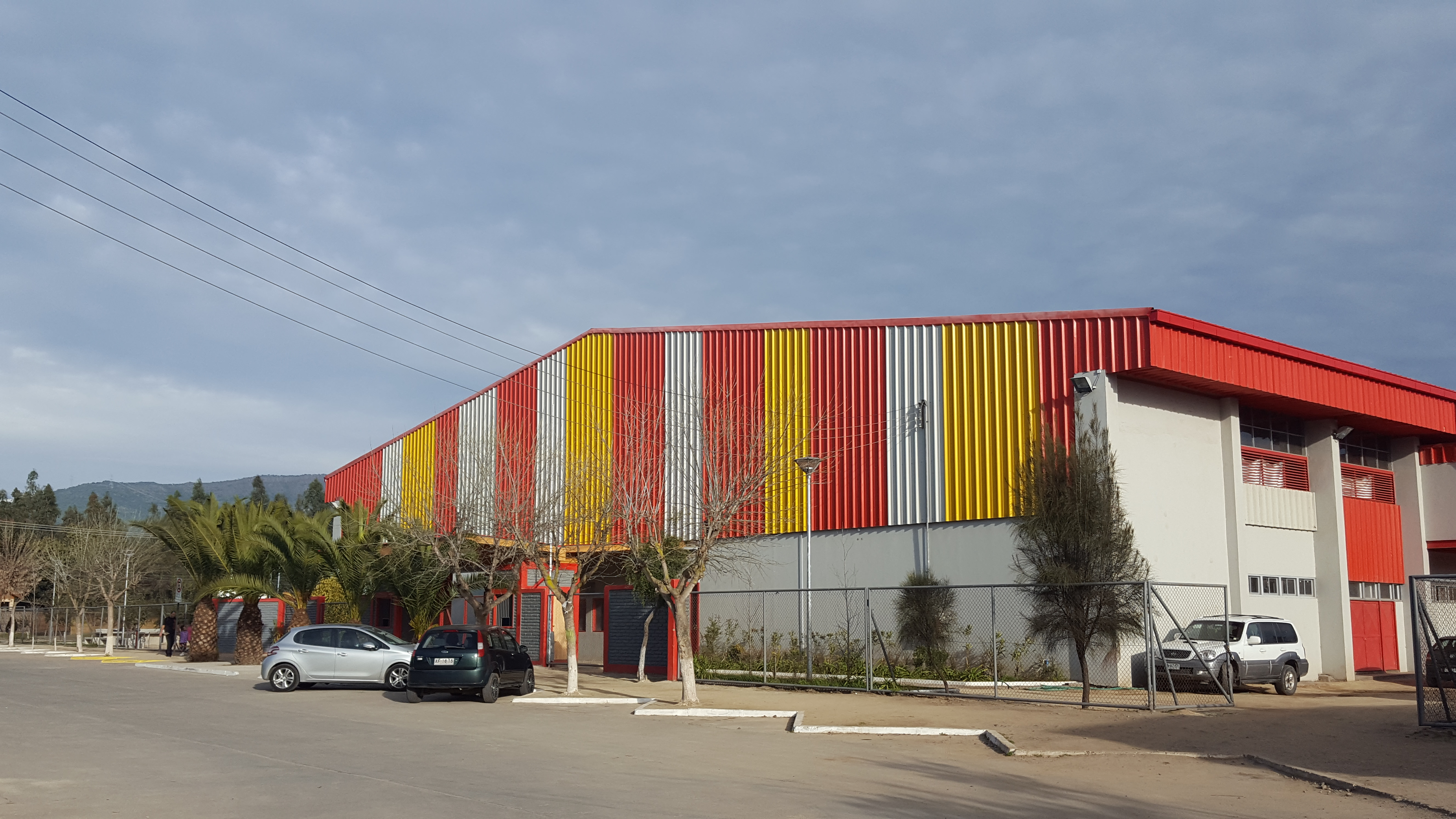 Gimnasio Municipal de Rengo en 2016